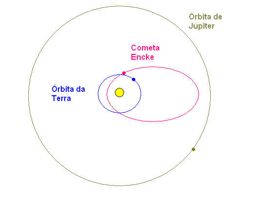 User: OS2Warp